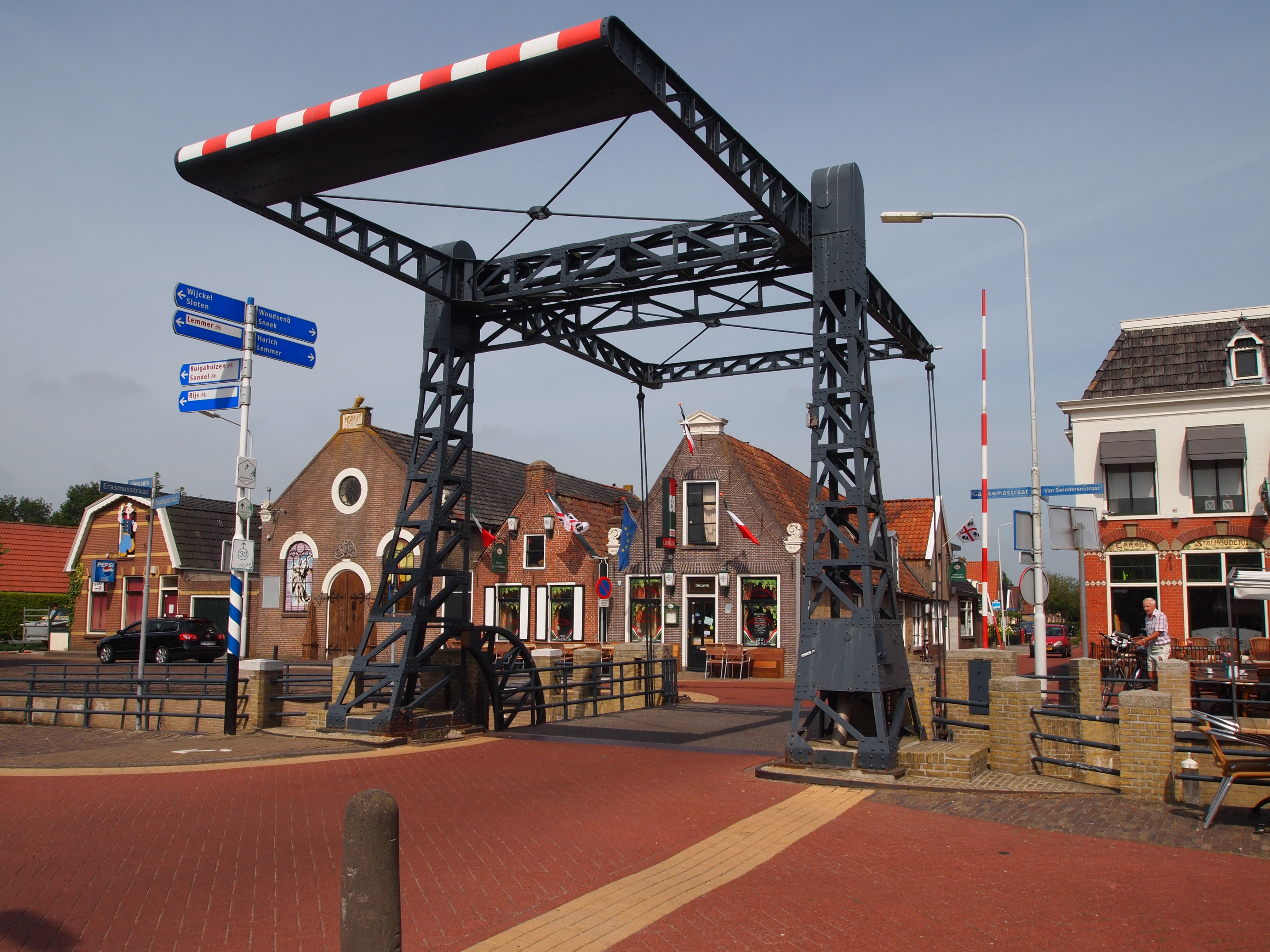 Teernstrabrug, Swinderenstraat, Balk